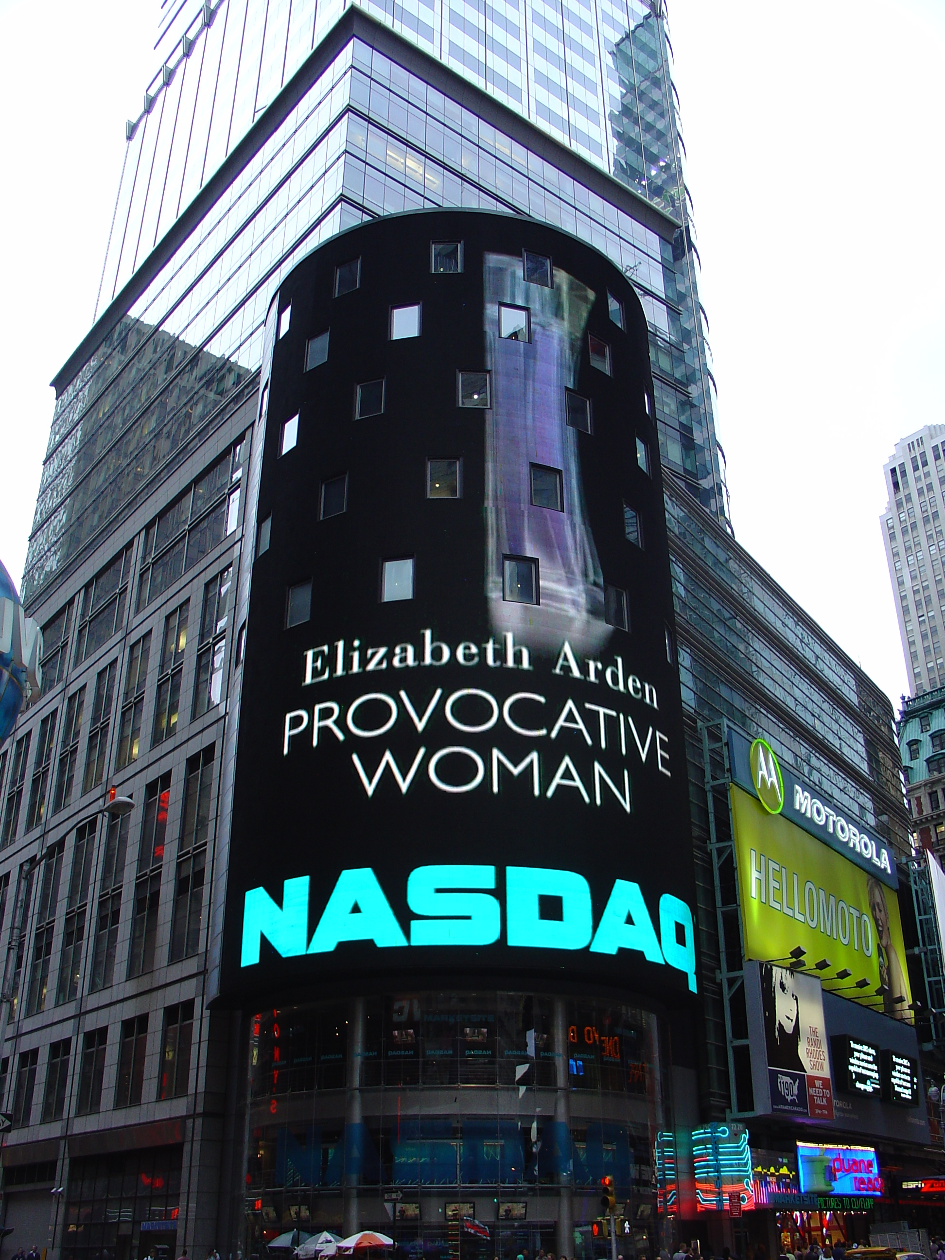 Ecran du Nasdacq sur Times Square Photo : Benjamin Kerr